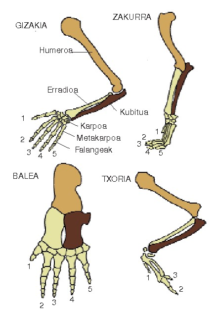 Oso inguru desberdinetara egokitutako lau ornodunen aurreko gorputz adarretako hezurrak.